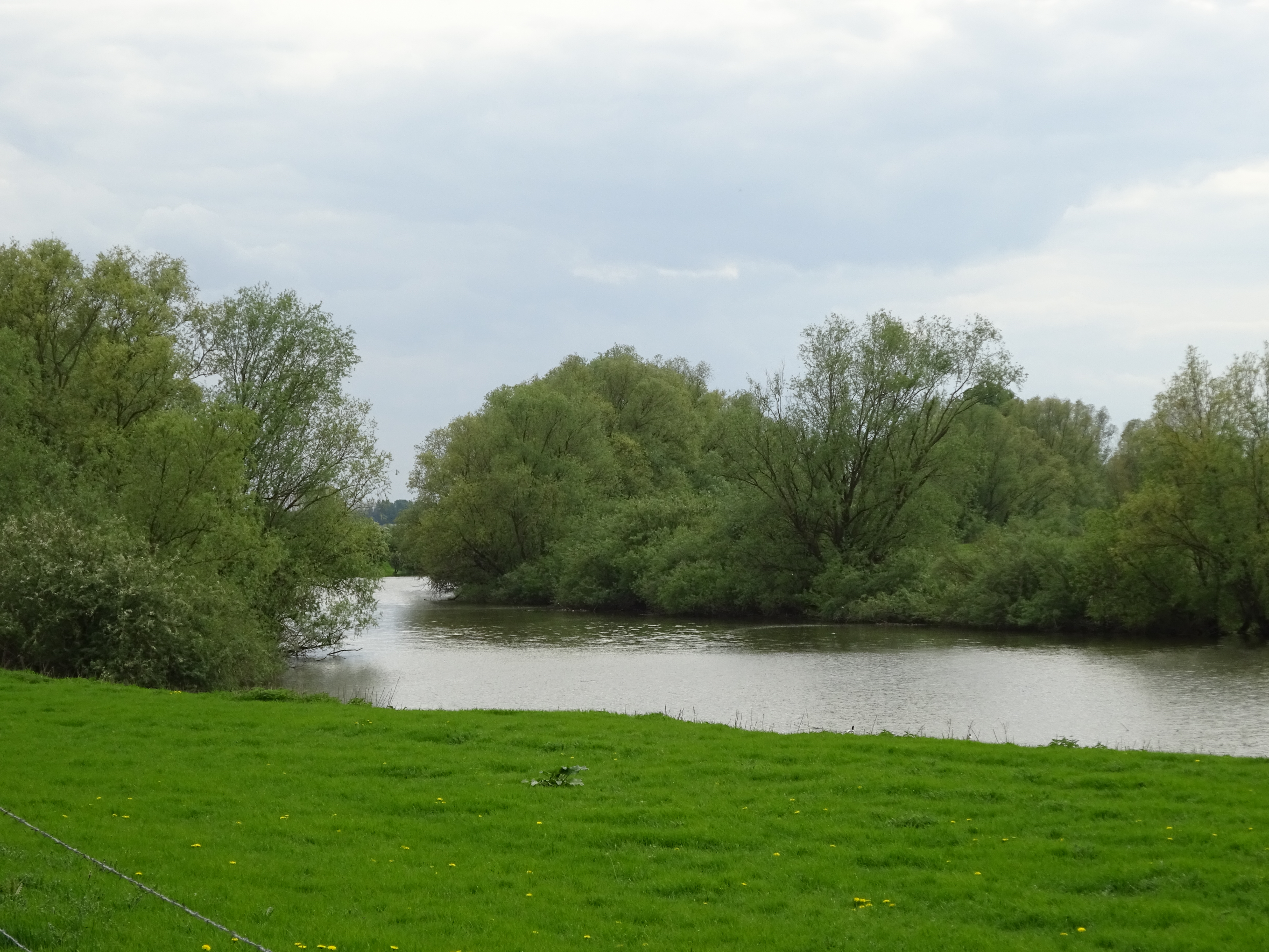 Rees-Grietherbusch (LSG-Rheinufer). Aussicht auf Naturschutzgebiet Grietherorter Altrhein